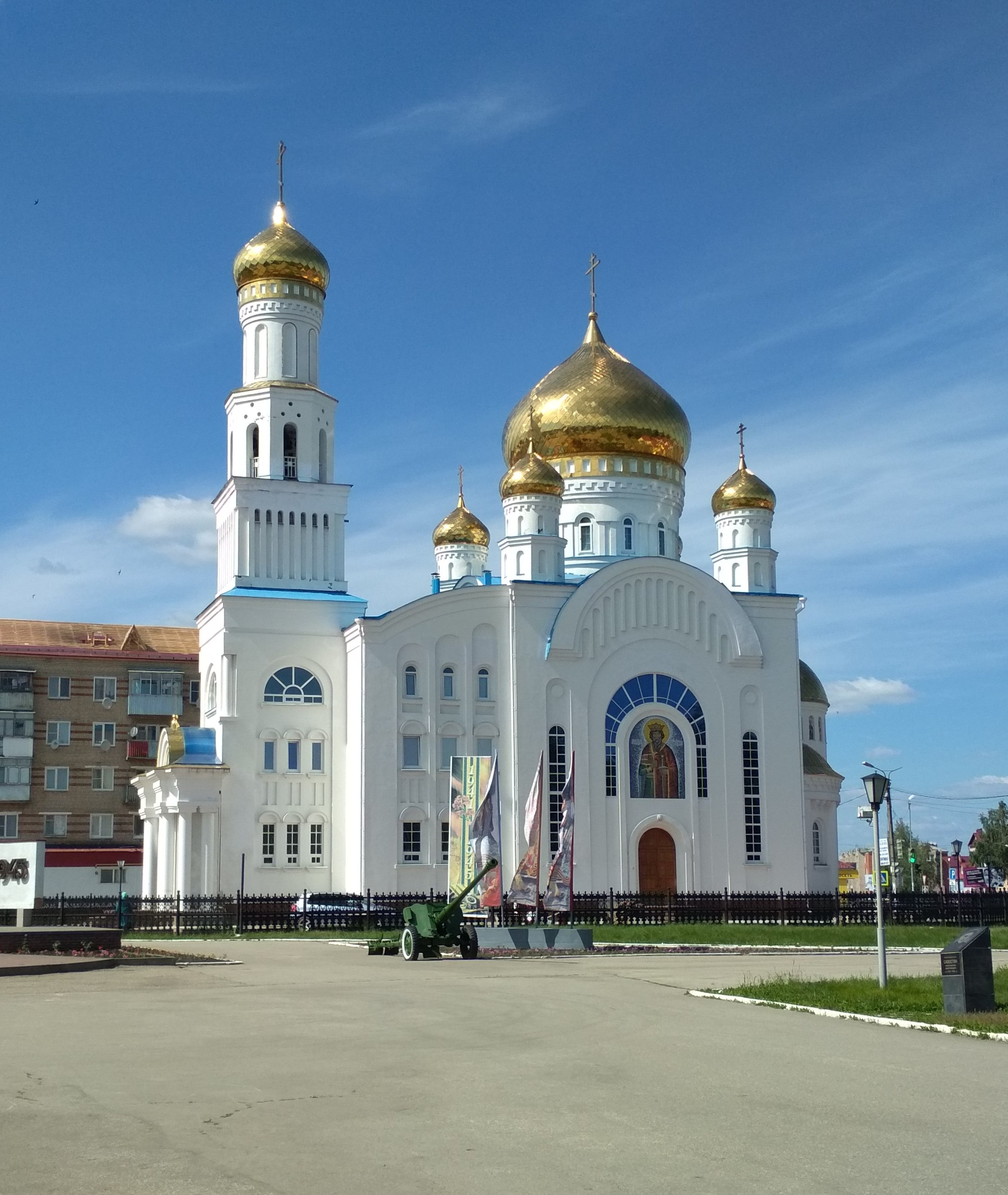 Собор Воскресения Христова. Краснослободск., Мордовия